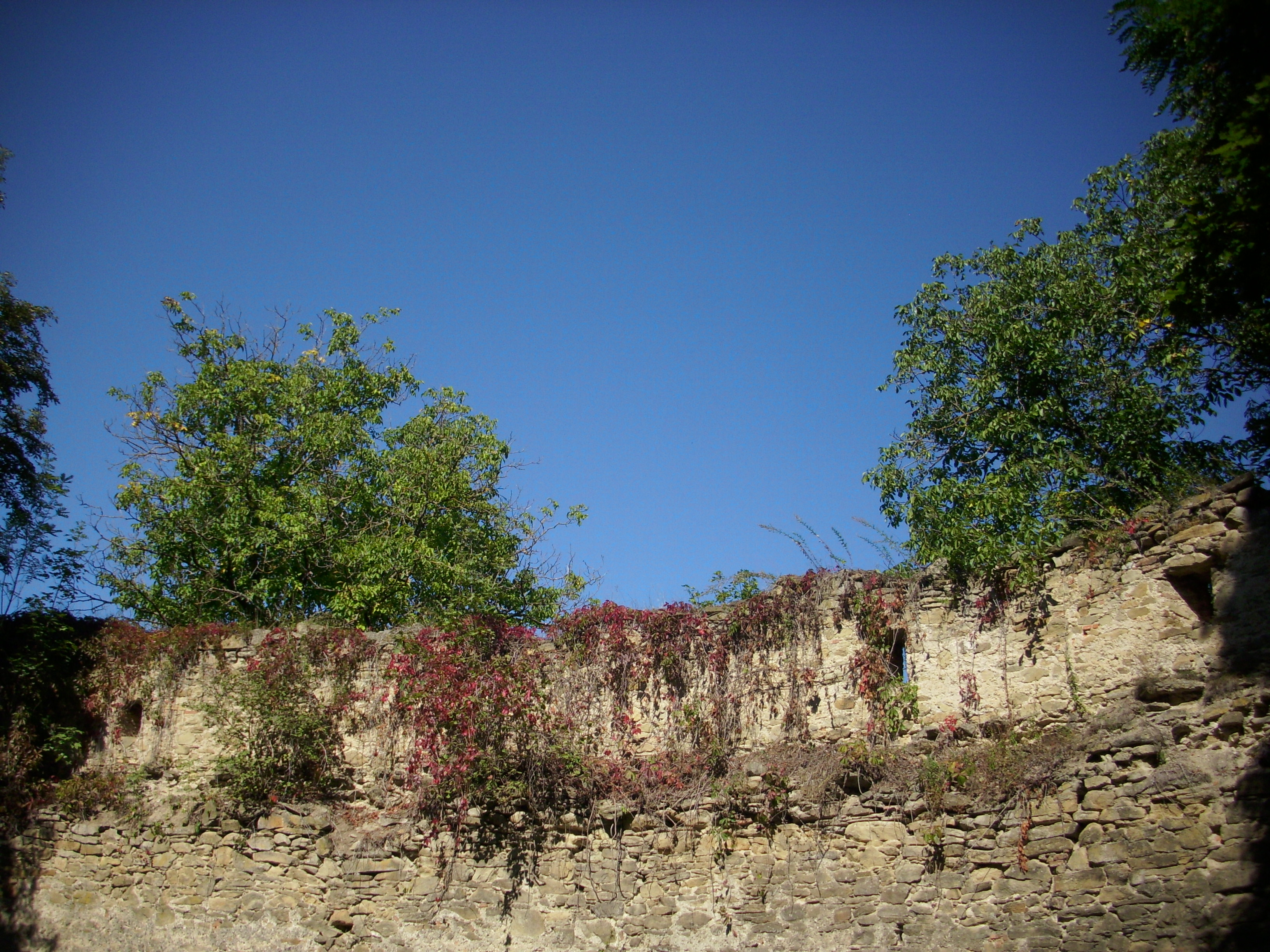 Este o incintă fortificată rămas lângă biserica reformată. Poza fost făcut în sfărsitul septembrie. 02